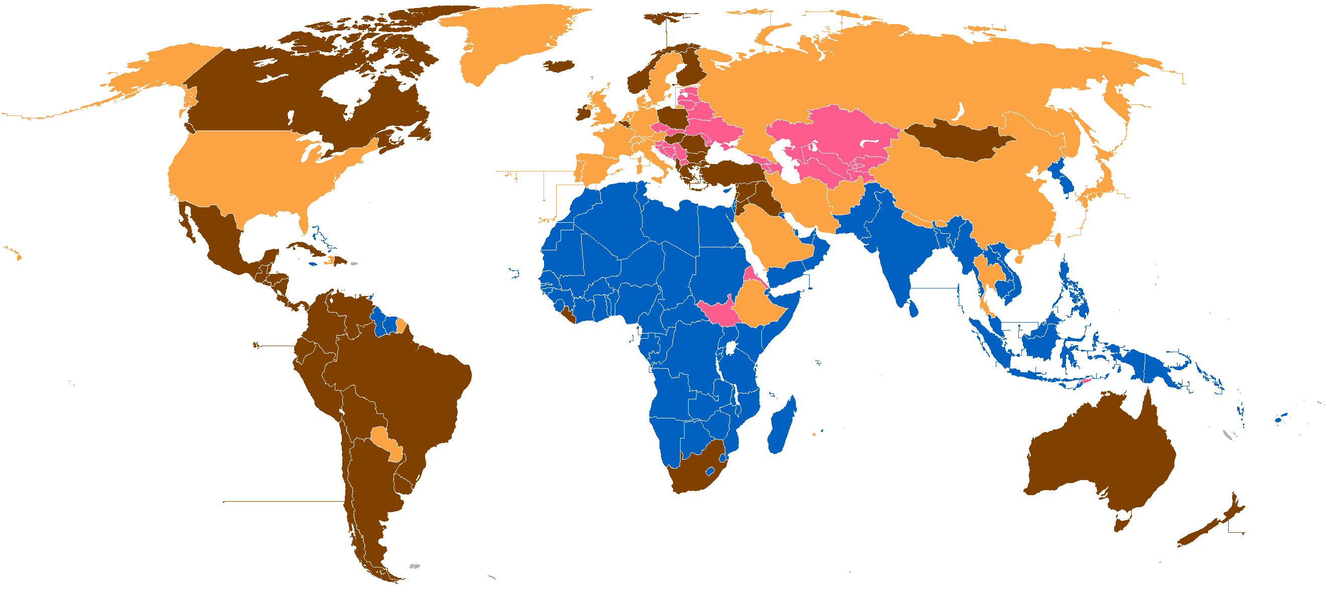 Formación de los países actuales. Antes de 1815 De 1815 a 1945 De 1945 a 1990 Después de 1990